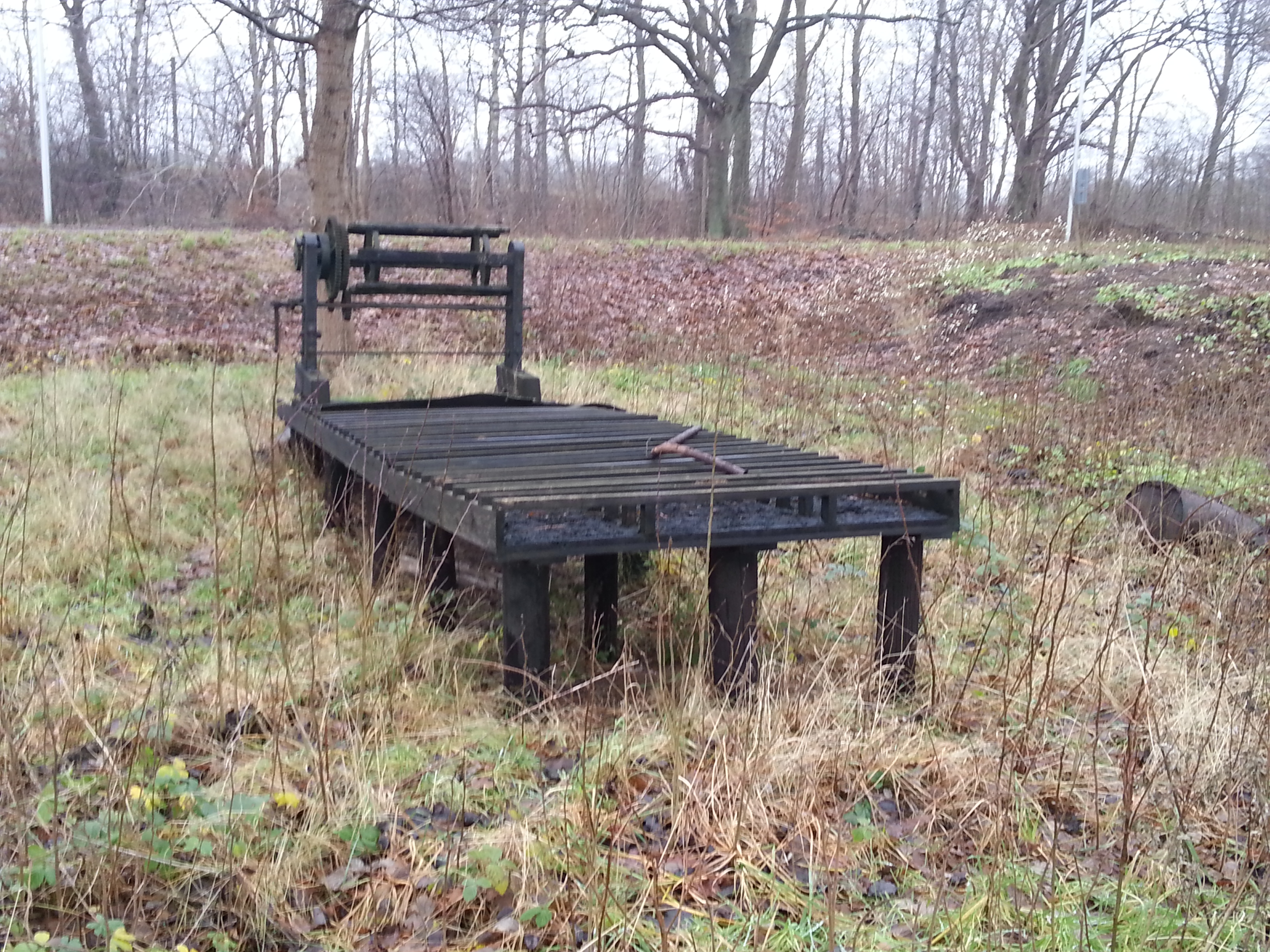 Tjærelad